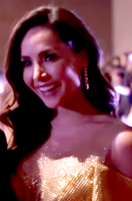 Roberto Manrique y Carmen Villalobos en los premios TVyNovelas 2018